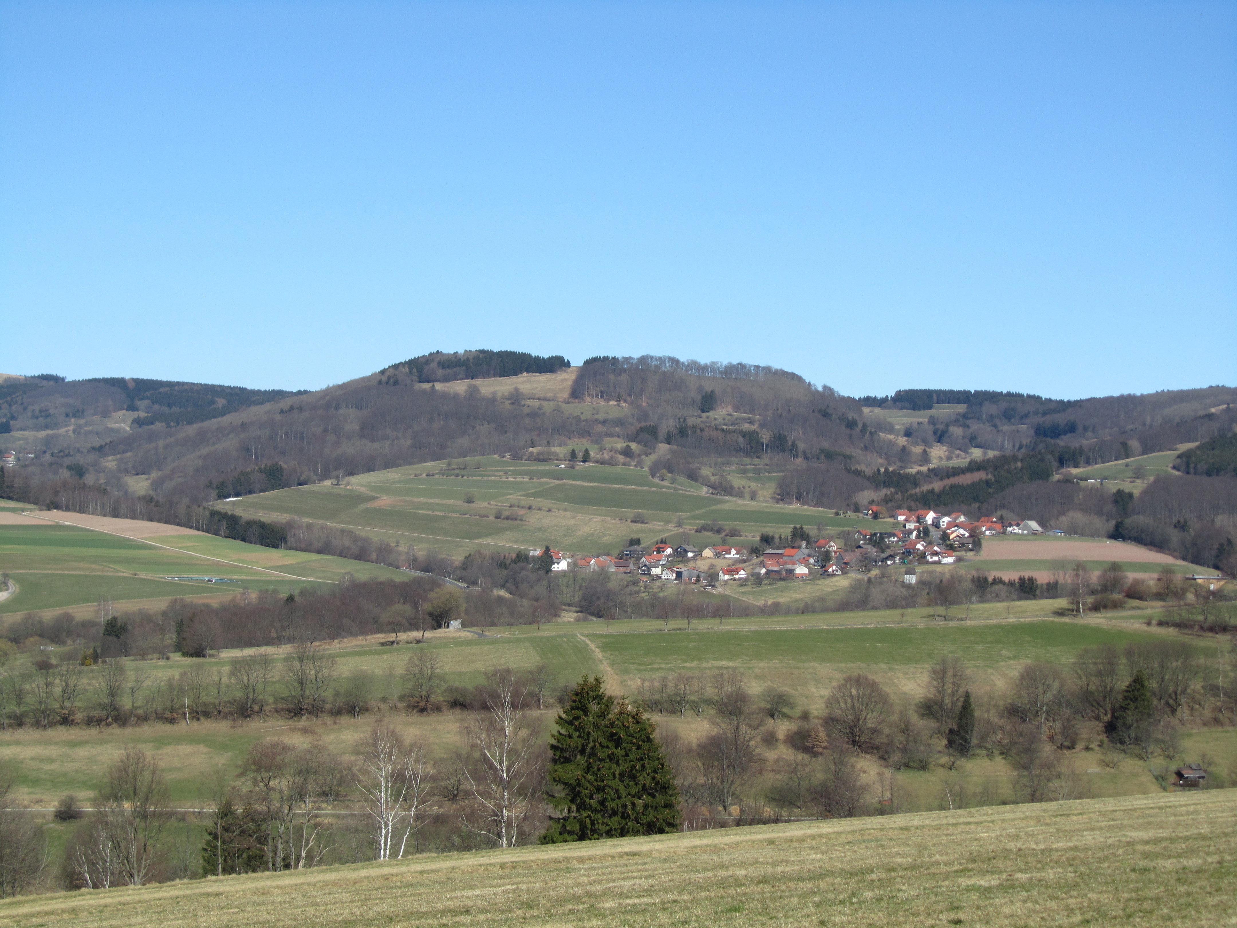 Der Feldberg (815 m) in der Rhön von Südwesten, davor der Ortsteil Sandberg von Gersfeld